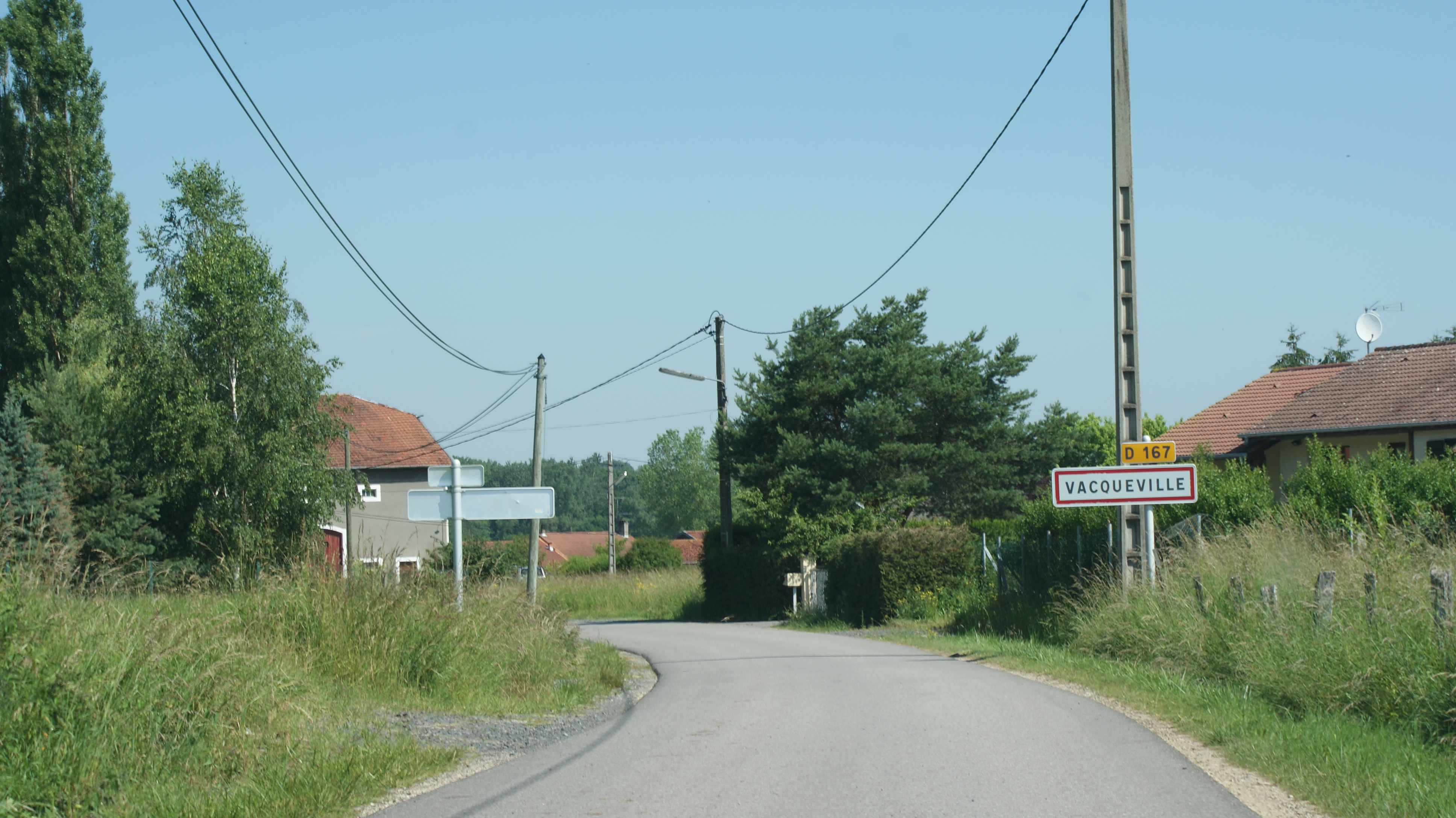 entrée du village